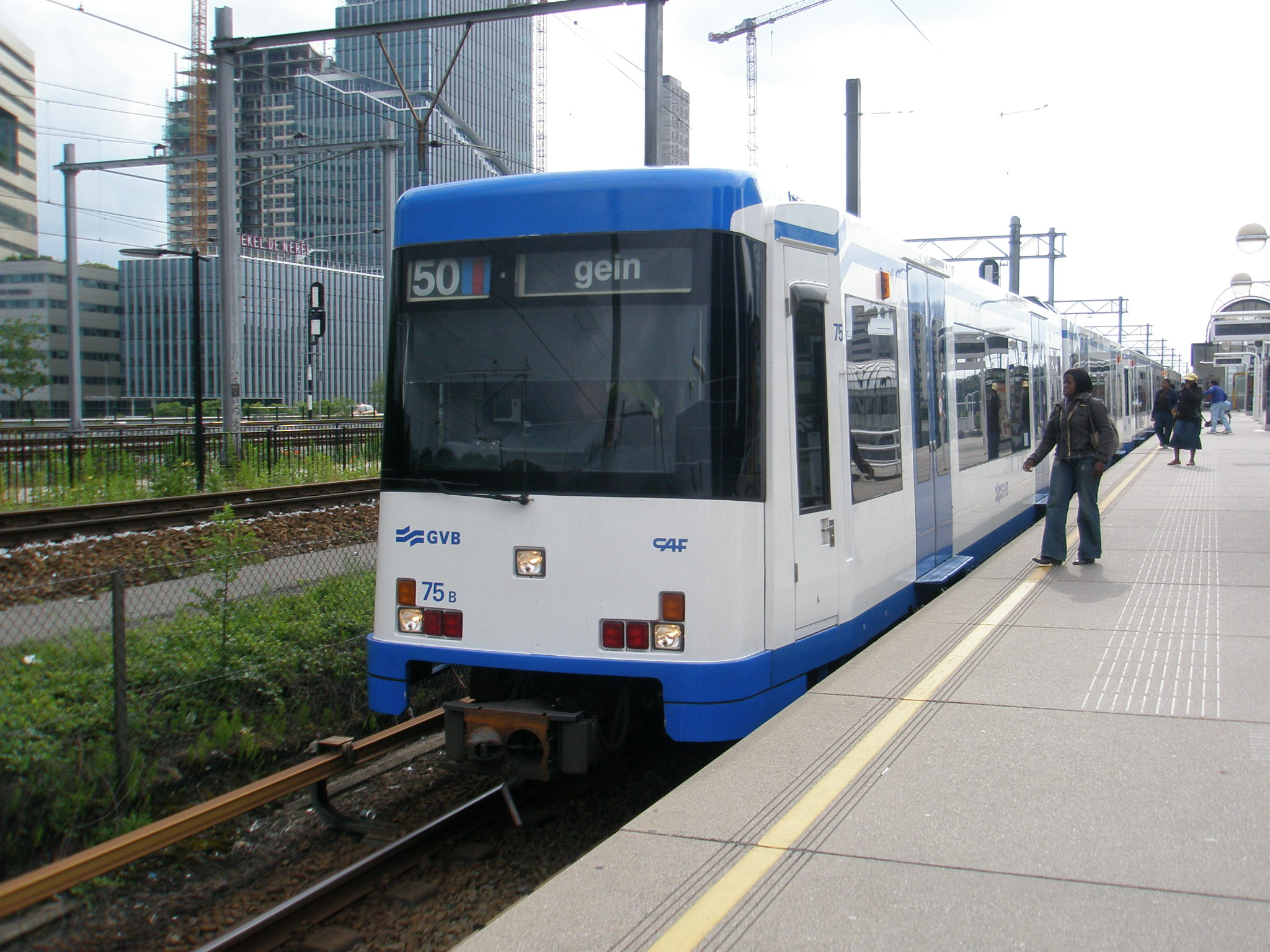 CAF metro Amsterdam